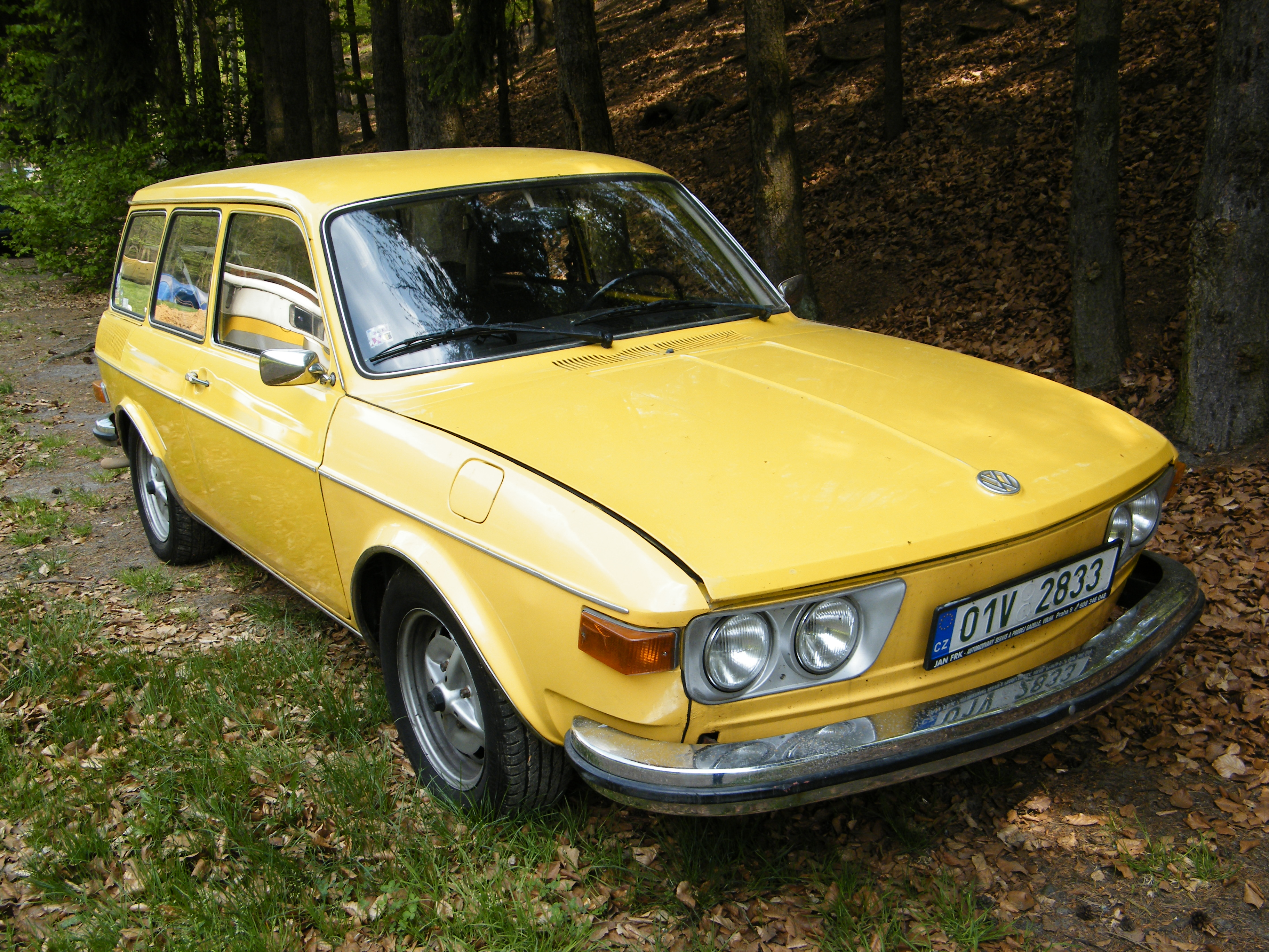 VW 412LS Variant